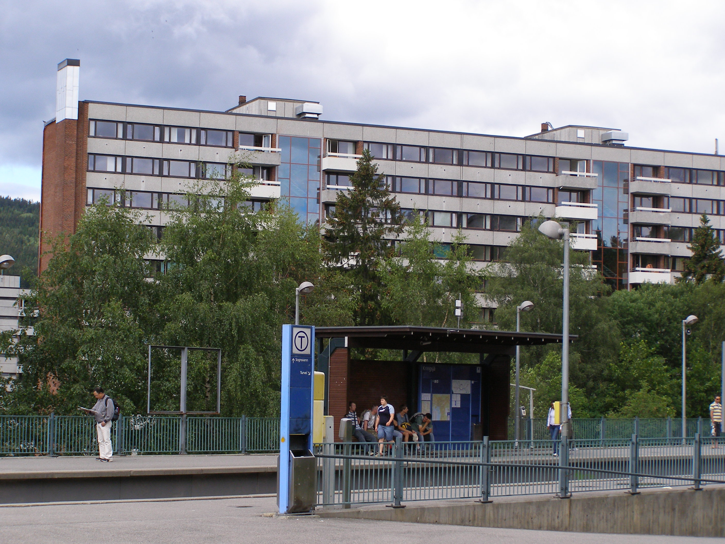 Kringsjå stasjon er nest siste stasjon på vestenden av Sognsvannsbanen til t-banen i Oslo. Bygget er tidligere bygg 1 (med oppgang A og B) på Kringsjå studentby, nå Olav M. Troviks vei 2-4.